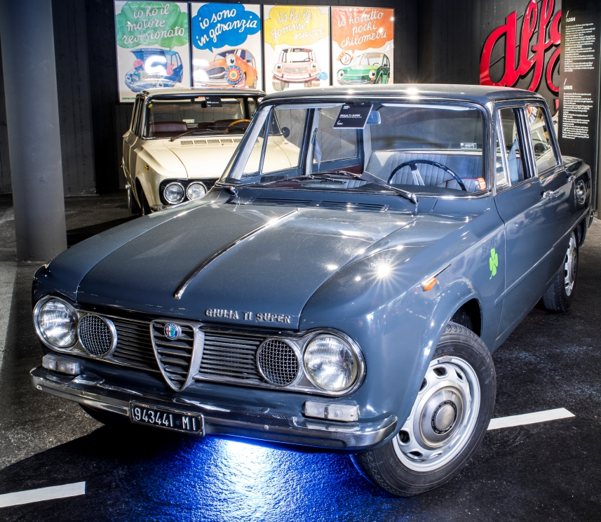 Alfa Giulia 1600 TI pezzo unico